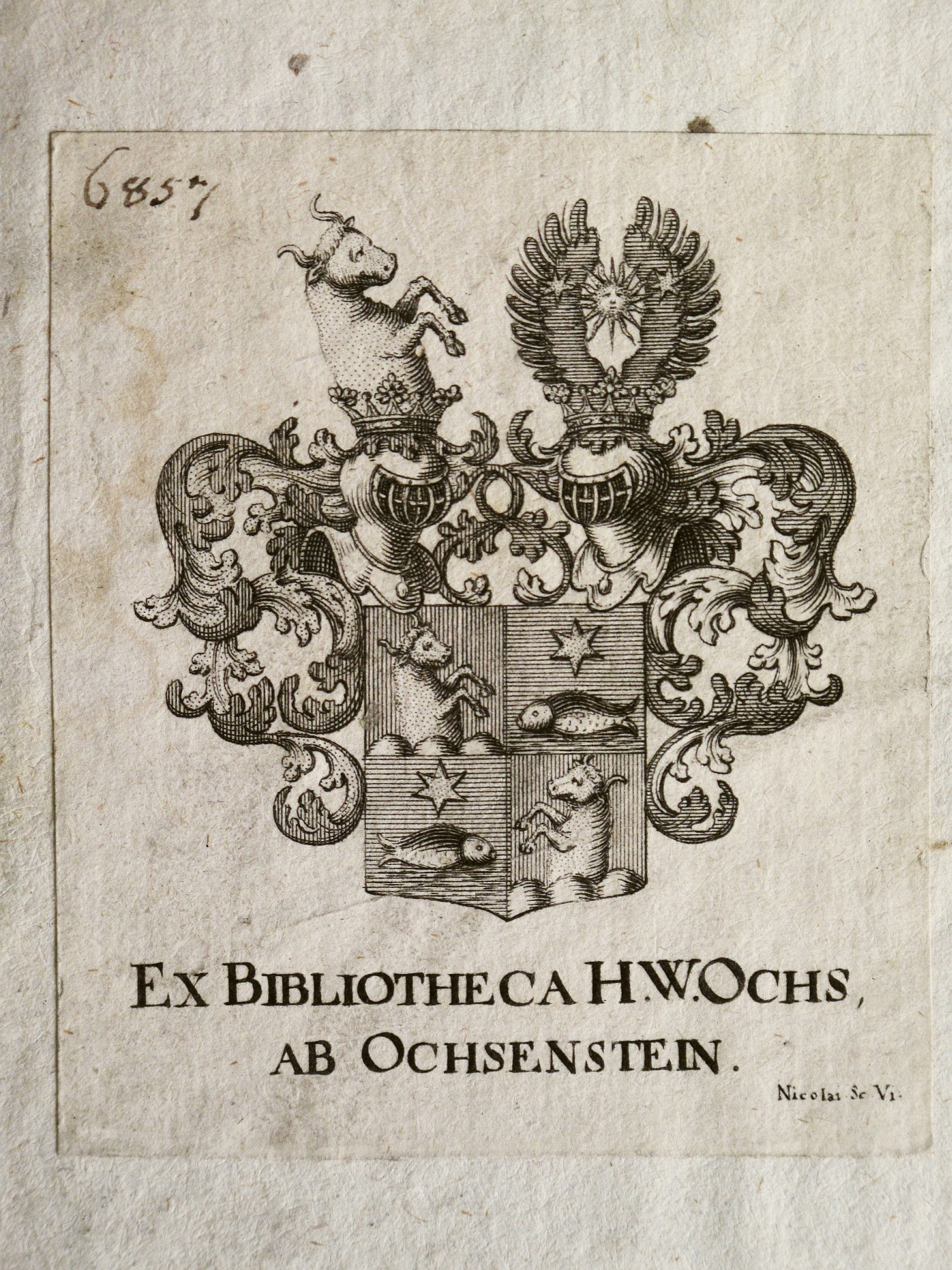 Exlibris Heinrich Wilhelm Ochs von Ochsenstein aus dem Buch: Selectae de fide controversiae / auth. P. Caesare Jo. Baptista Comitinuo. Parisiis : Henault, 1665. Wissenschaftliche Stadtbibliothek Mainz. Signatur: XIII n 800